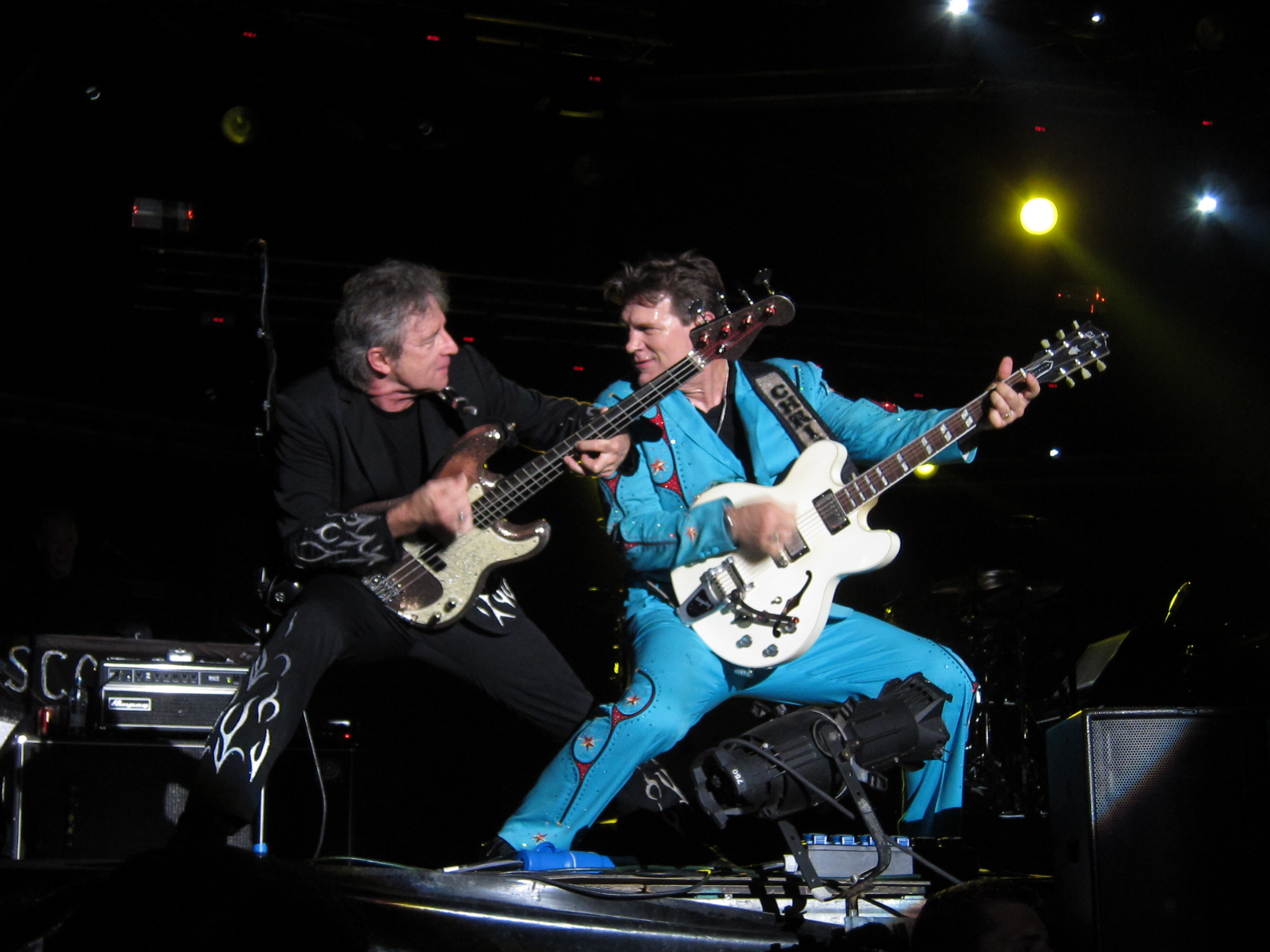 Chris Isaak, Xardíns do Posío, Ourense. 24 Jun 2010